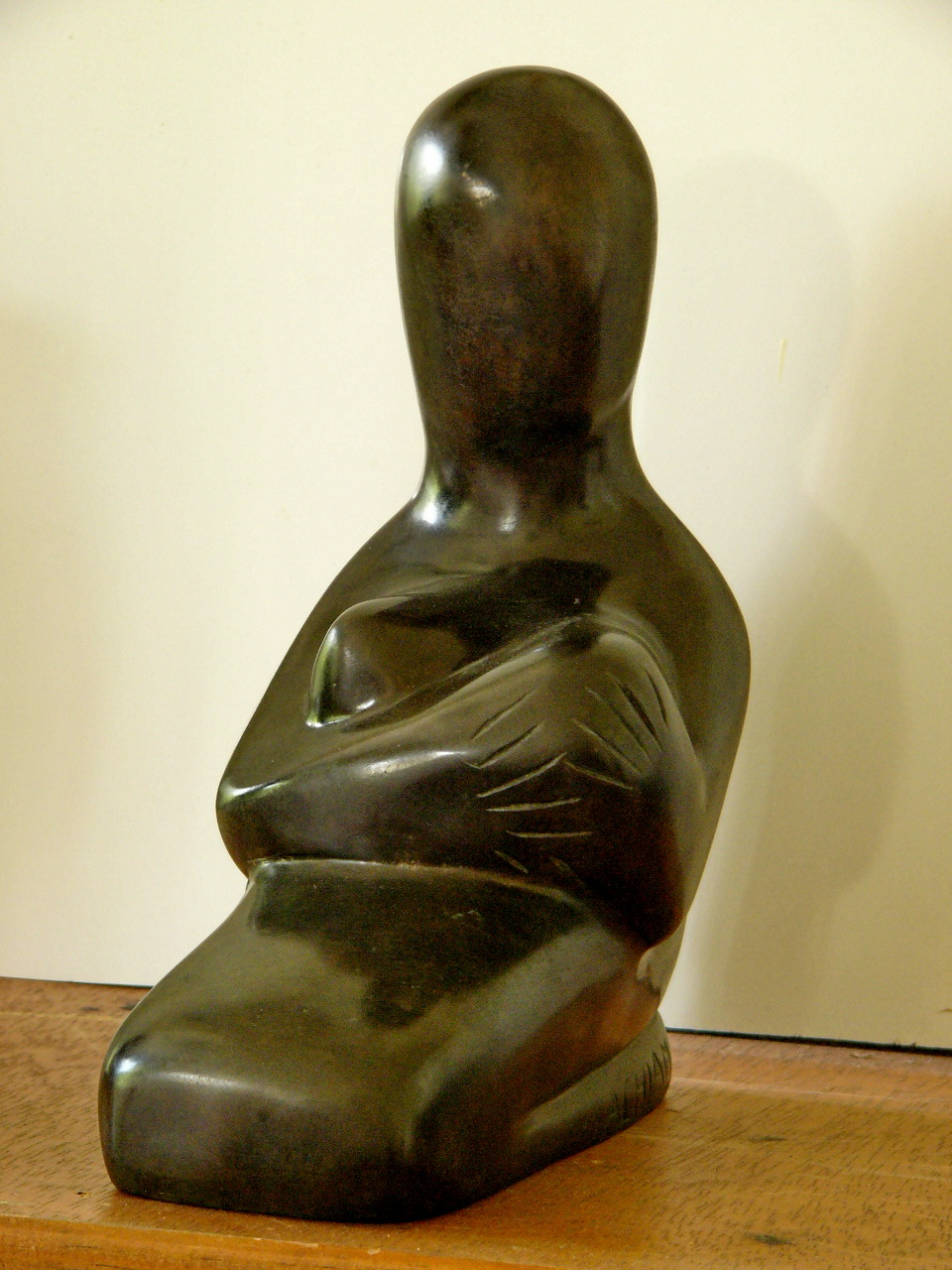 Achiam : Allaitement N°3 (Bronze), sculpture créée en 2000, collection personnelle